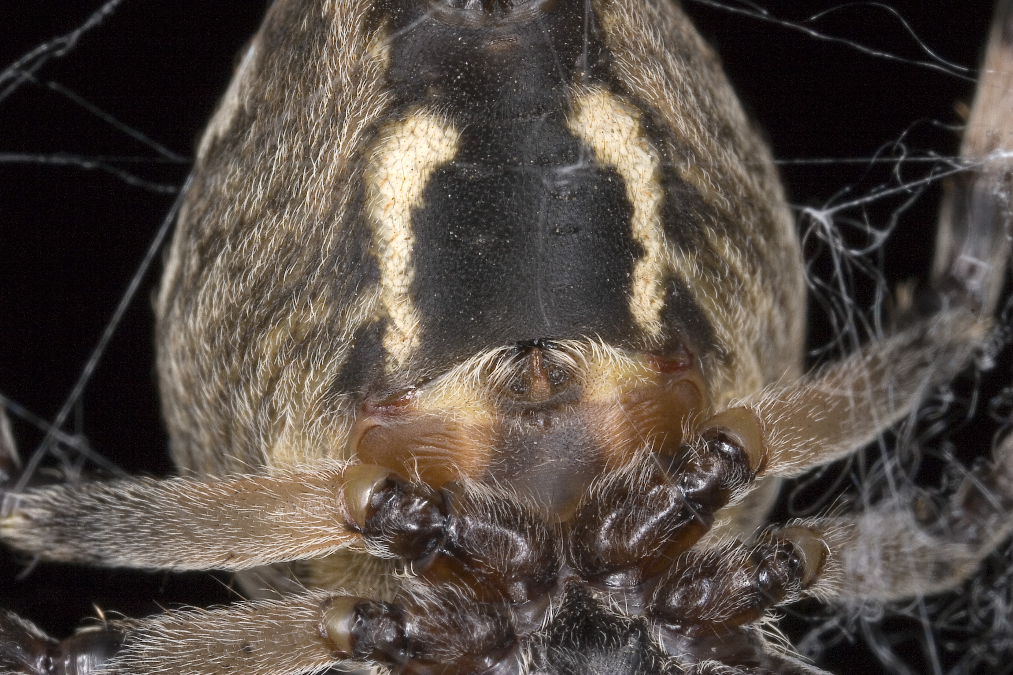 Spinnendetail Location: Dresden, Blaues Wunder (Saxony, Germany) 8/65 f16 Film / Speed: ISO 100 Comment: Canon Ring Flash MR-14EX